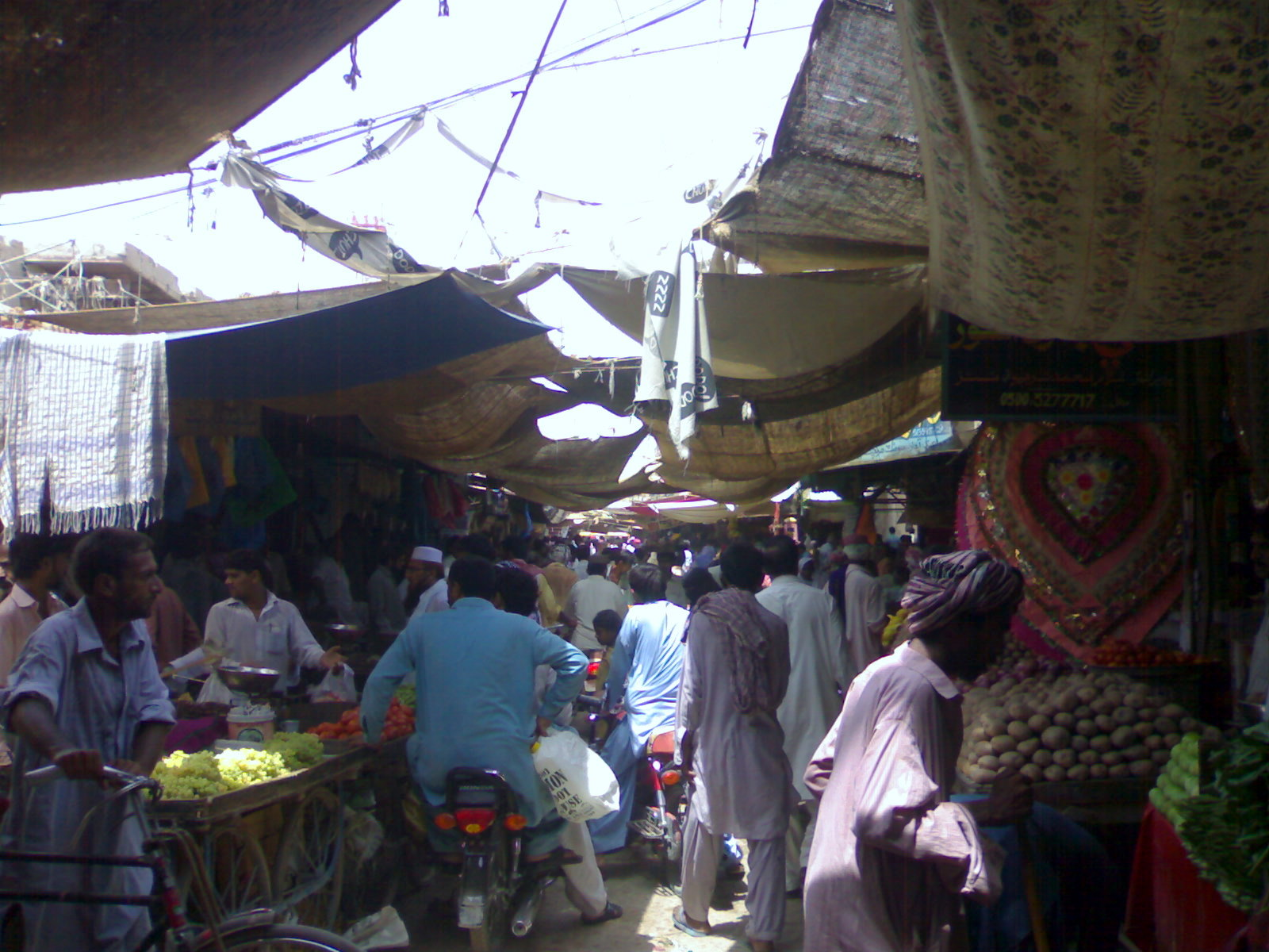 Sabzi Market